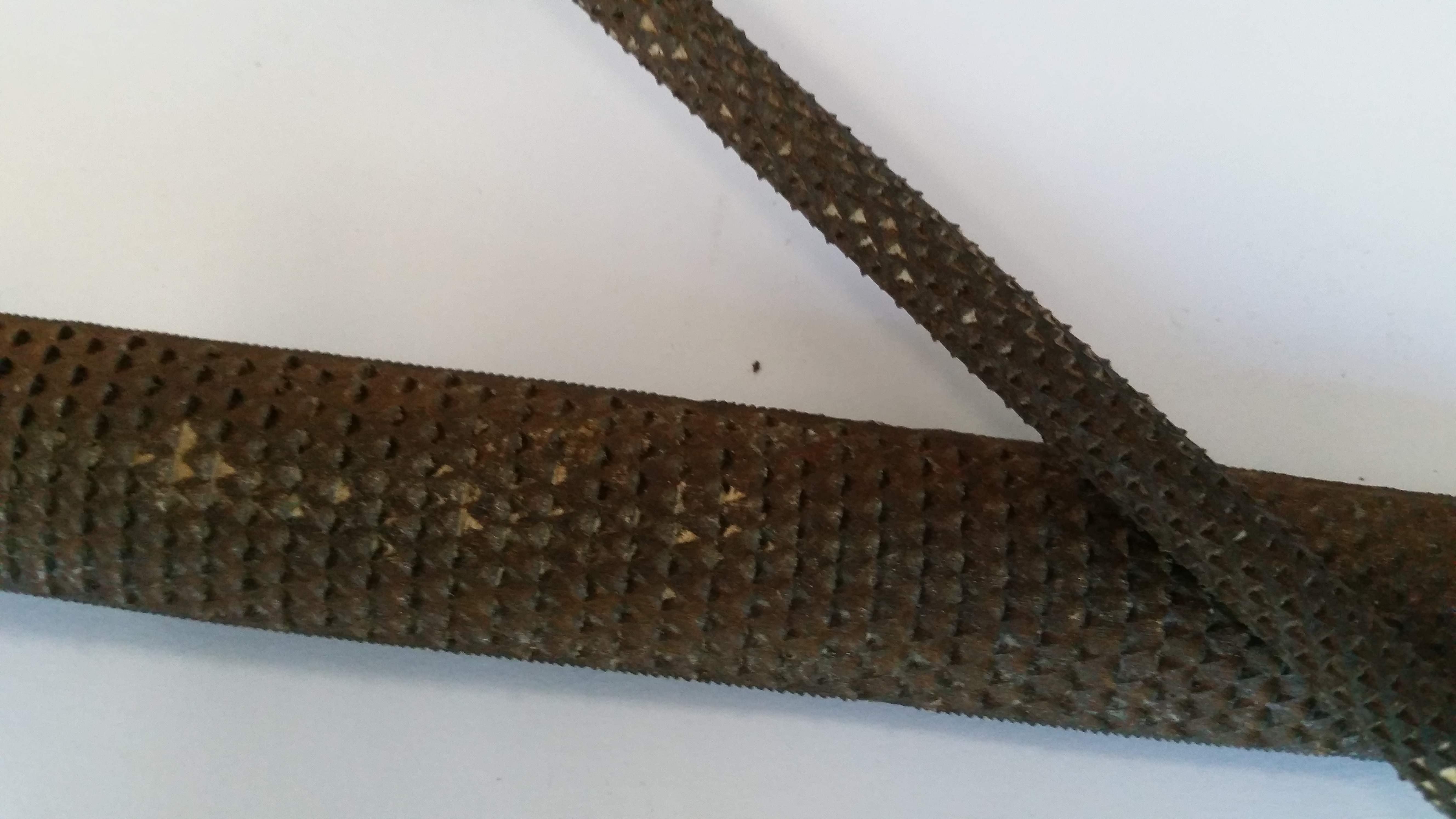 Detalle dos dentes dunha escofina